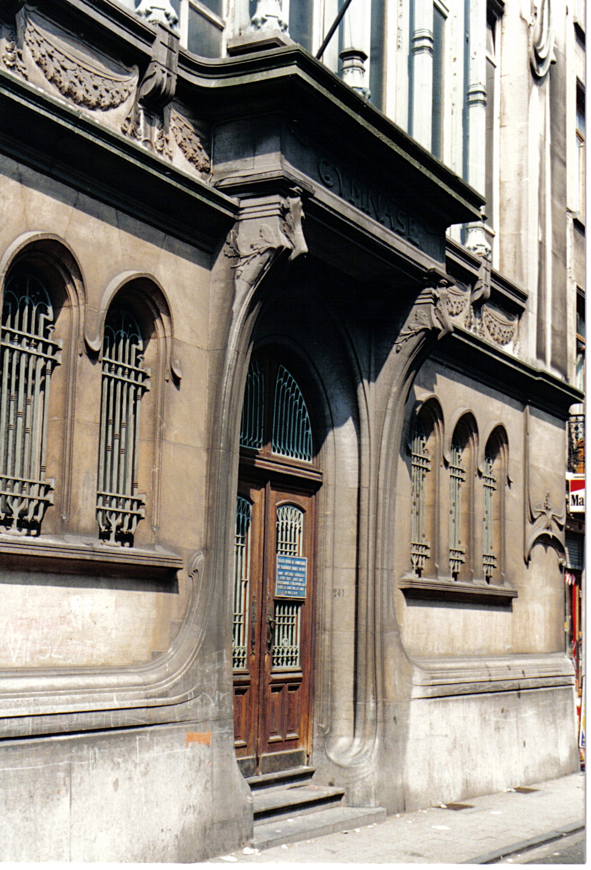 Henri Jacobs - Ecole Josaphat - rue Josaphat 241 à Schaerbeek (Art nouveau)